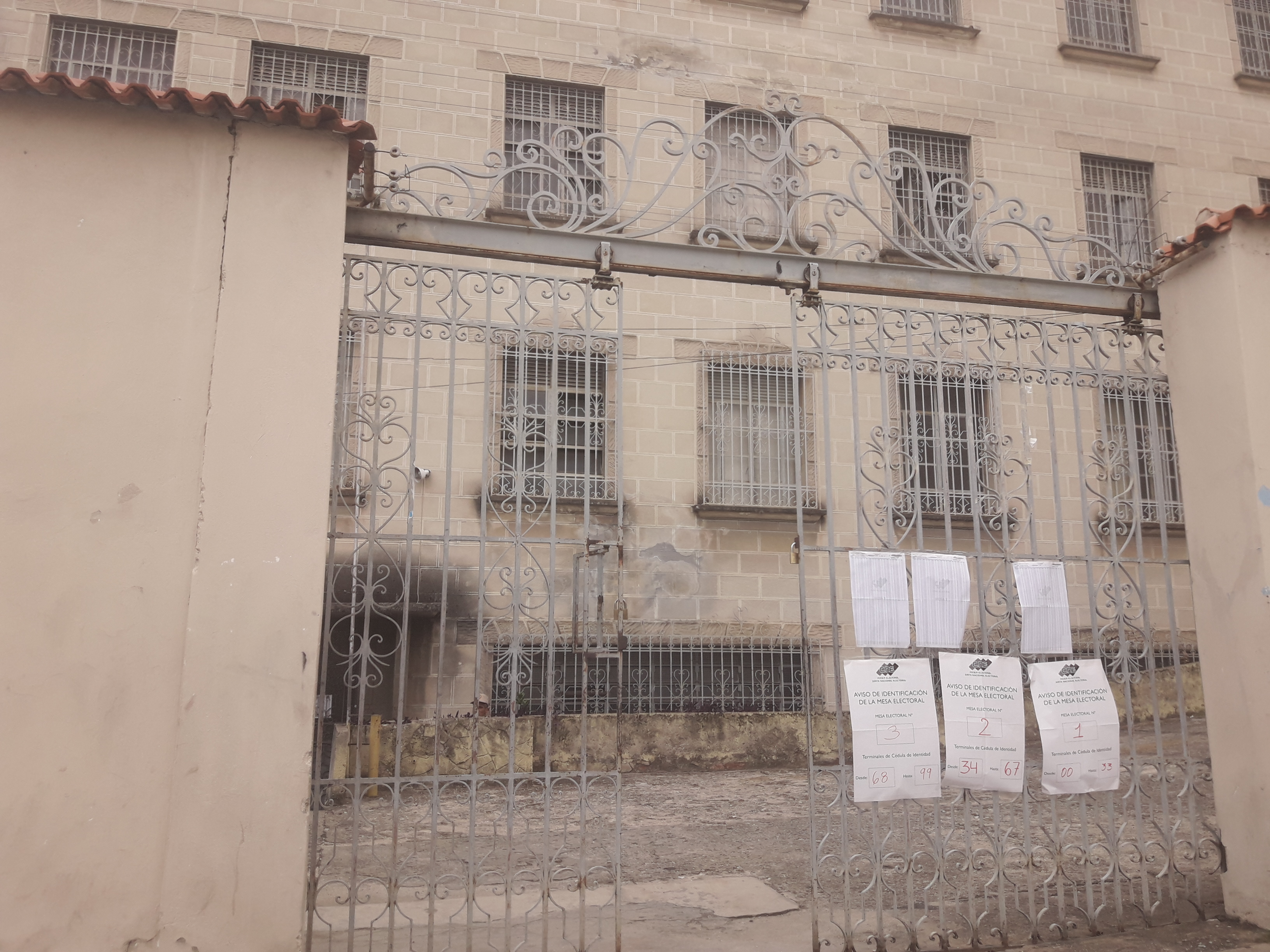 Centro electoral vacío en Caracas en las elecciones presidenciales de 2018.